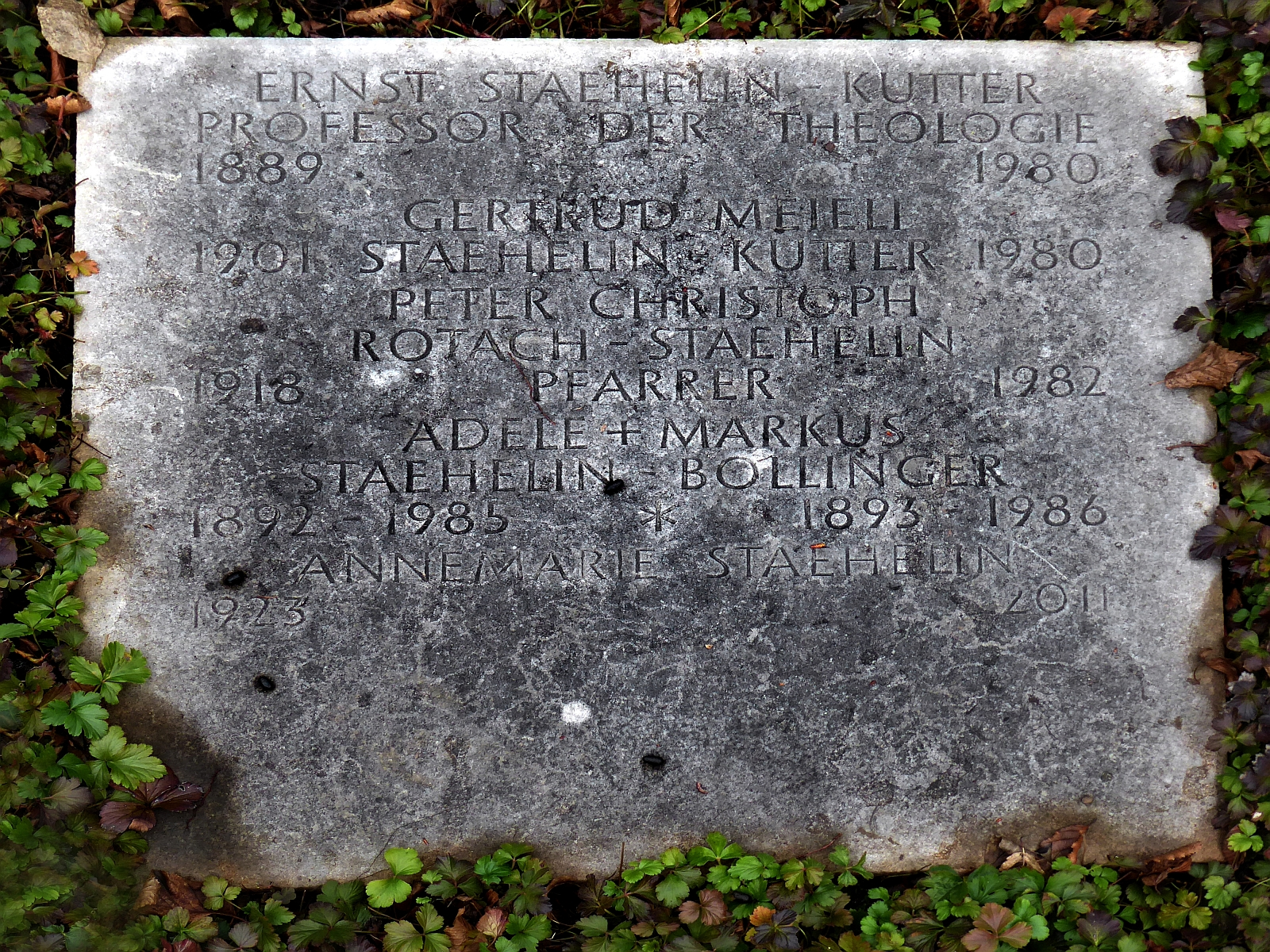 Ernst Stähelin-Kutter (1889–1980) lic.theol., Dr.h.c. Prof. für neuere Kirchengeschichte, Uni Rektor, u.a 1936-80 Lektor des Frey-Gymnasium. 1933-47 Mitglied des Kirchenrats, Familiengrab auf dem Friedhof Hörnli, Riehen, Basel-Stadt